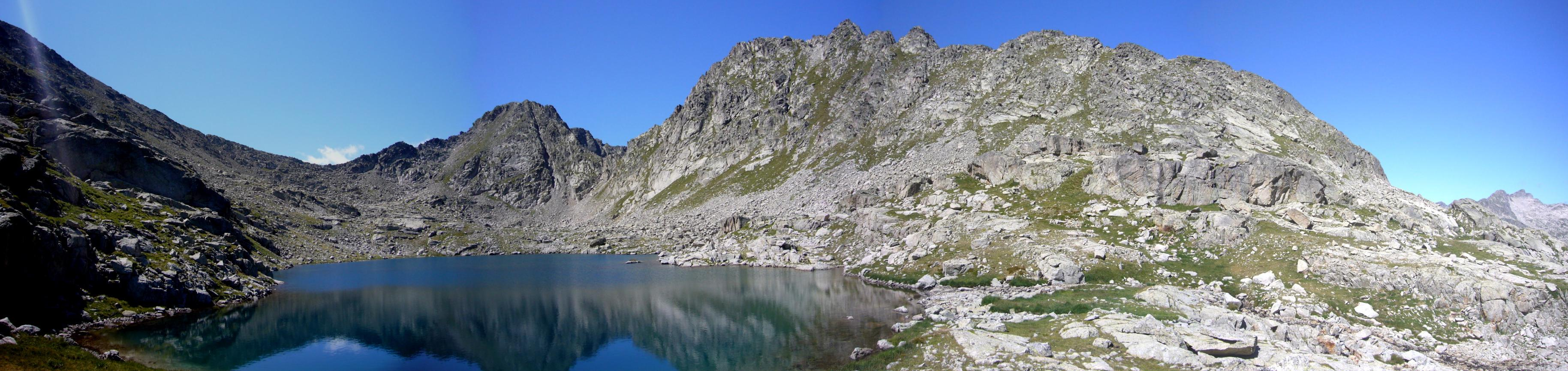 Estany Inferior dels Gavatxos i part superior de la Coma dels Pescadors; Espot, Pallars Sobirà, Catalunya